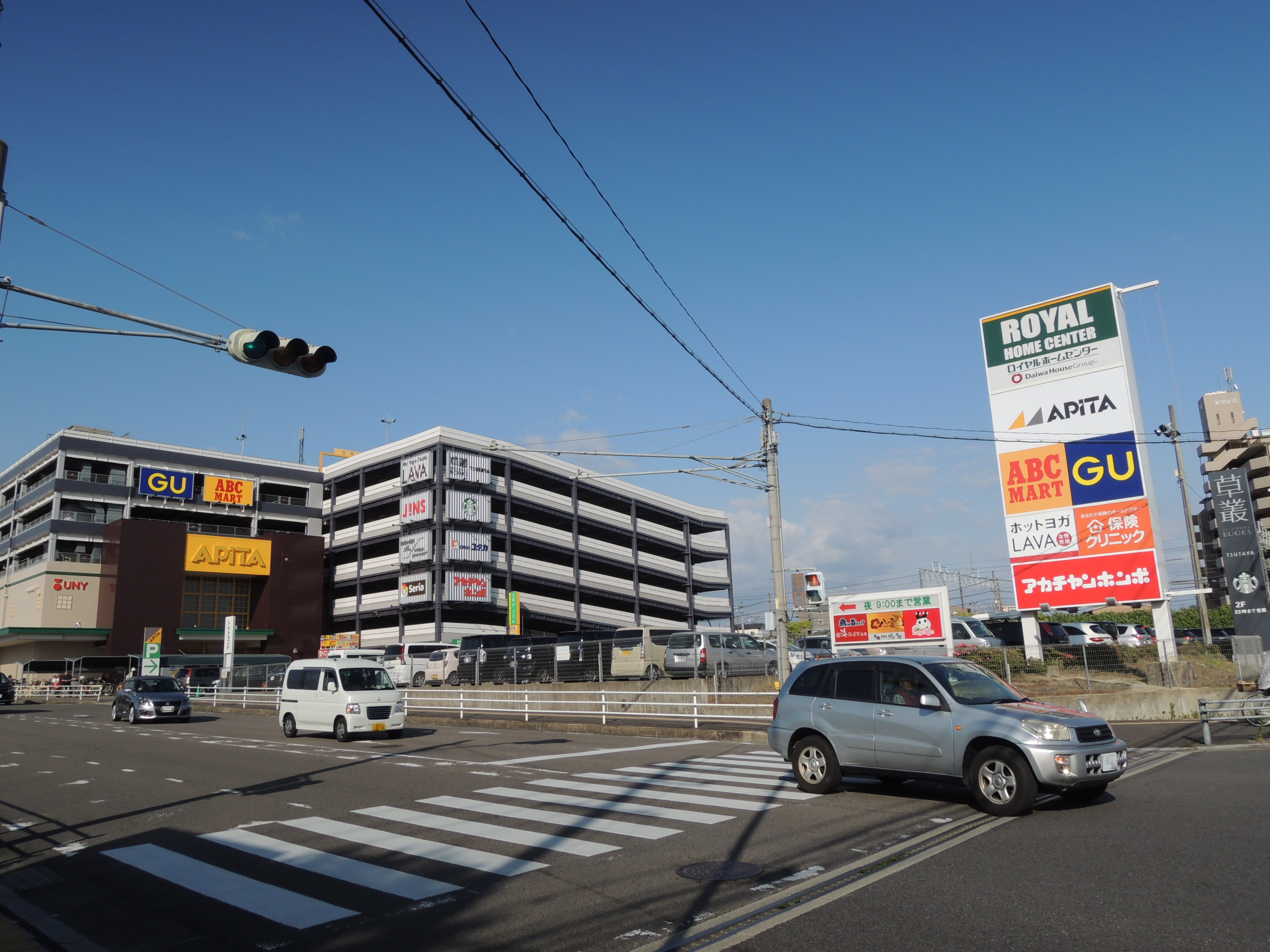 アピタ新守山店 店舗外観 草叢BOOKSなどテナントが掲載されています。